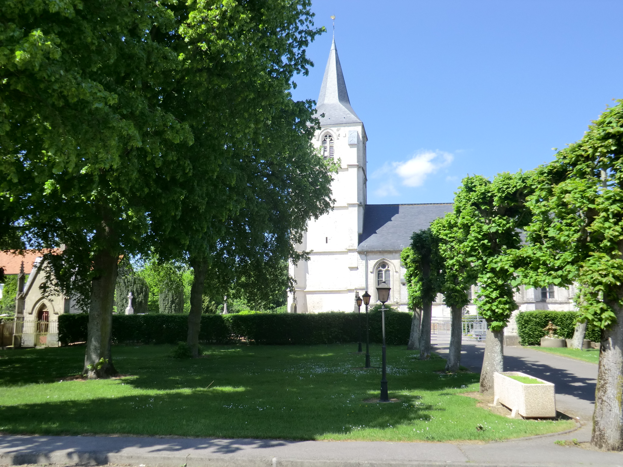 Église de Cléty, village du Nord-Pas-de-Calais, France.